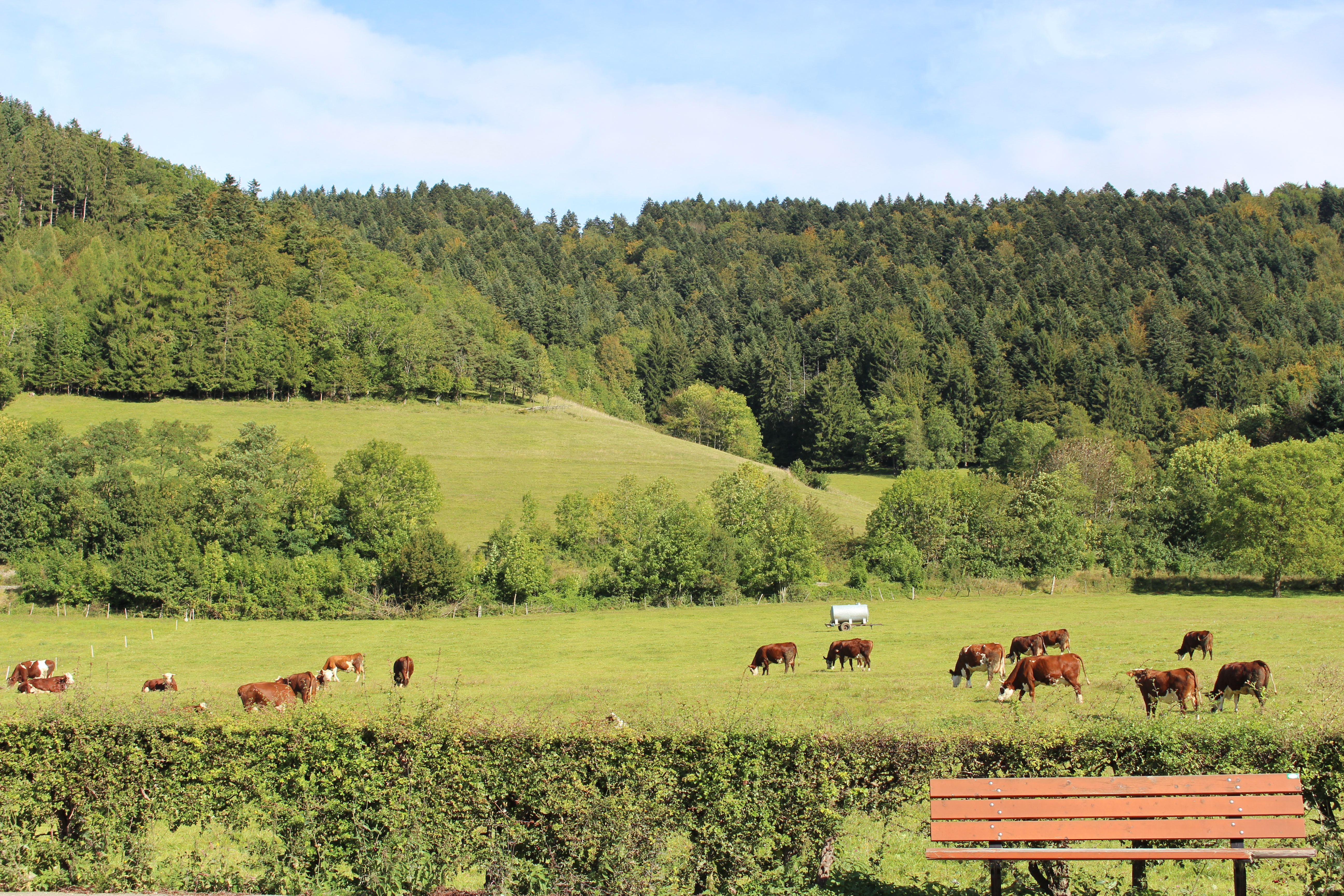 Коровы в Монестье-Де-Клермоне